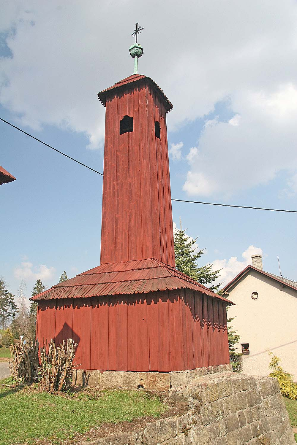 zvonice v obci Žampach, district Ústí nad Orlicí autor: Prazak date: 20. 4. 2006